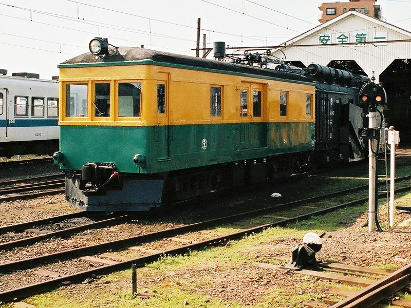 東関屋駅（新潟交通電車線）にて撮影。